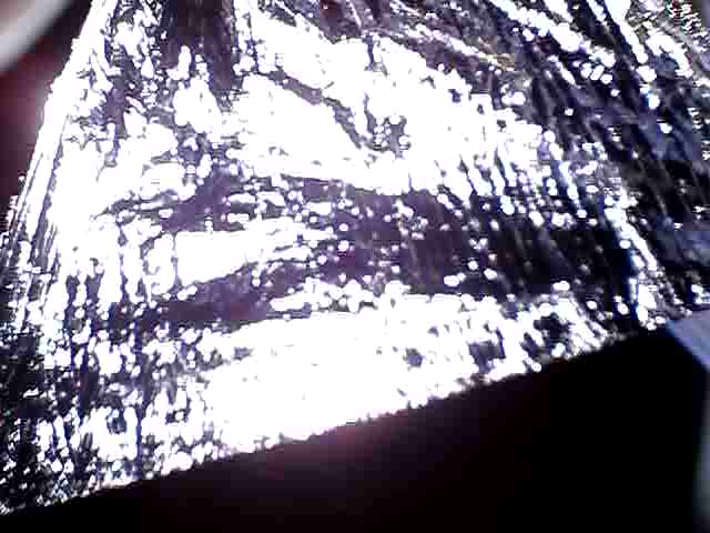 Satelita PW-Sat2 otworzył 29 grudnia 2018 roku swój żagiel deorbitacyjny na orbicie. Zdjęcie zrobione za pomocą jednej z kamer na pokładzie satelity przedstawia jedną ćwiartkę kwadratowej struktury tuż po jej otwarciu.